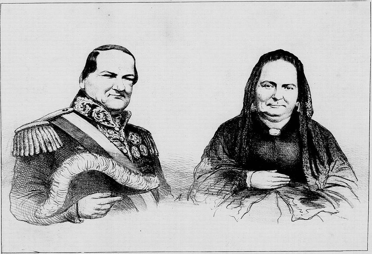 Carlos Antonio López e Joanna Paula Carrillo de López (pais de Francisco Solano López)